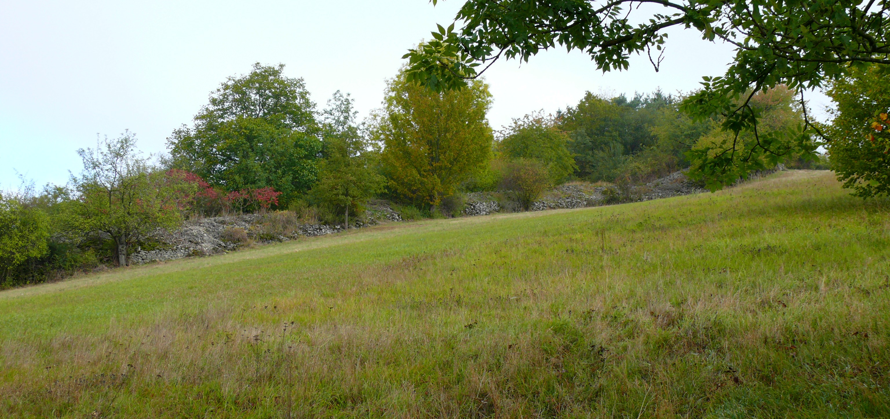 Steinriegel am Kluturlandschaftspfad Creglingen